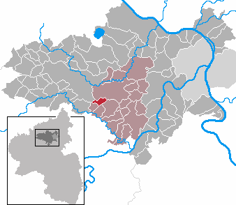 Einig in Rhineland-Palatinate - district Mayen-Koblenz